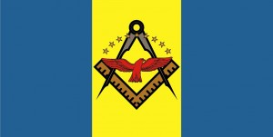 Знак матезісу: Прапор Союзу являє собою двокольорове прямокутне полотнище із трьох рівновеликих вертикальних смуг синього і жовтого кольорів із співвідношенням сторін 1:2. У центрі жовтої смуги прапора відтворено зображення емблеми Союзу.